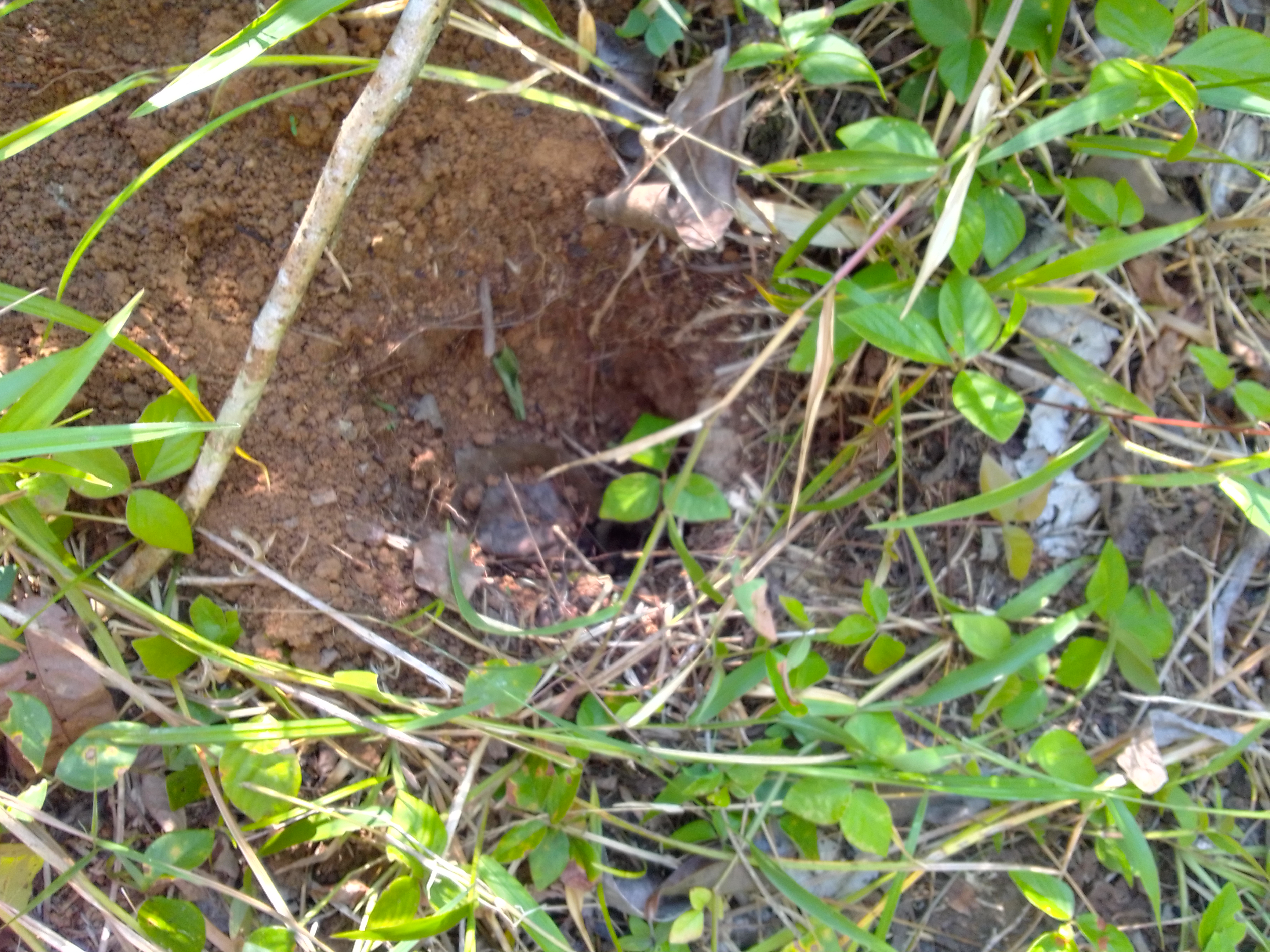 Hoyo de carachupa, armadillo, en la Amazonía de Iquitos